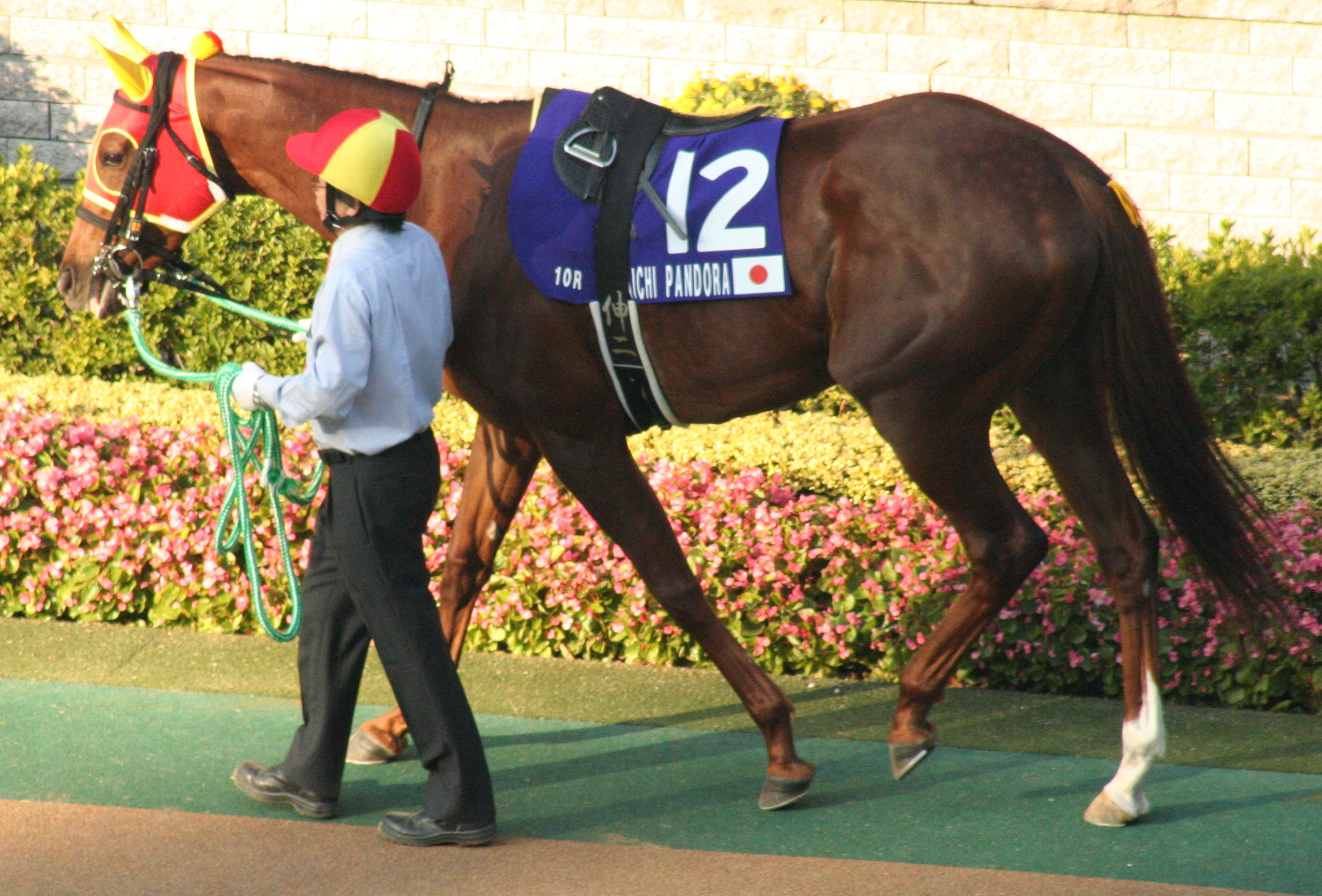 フサイチパンドラ